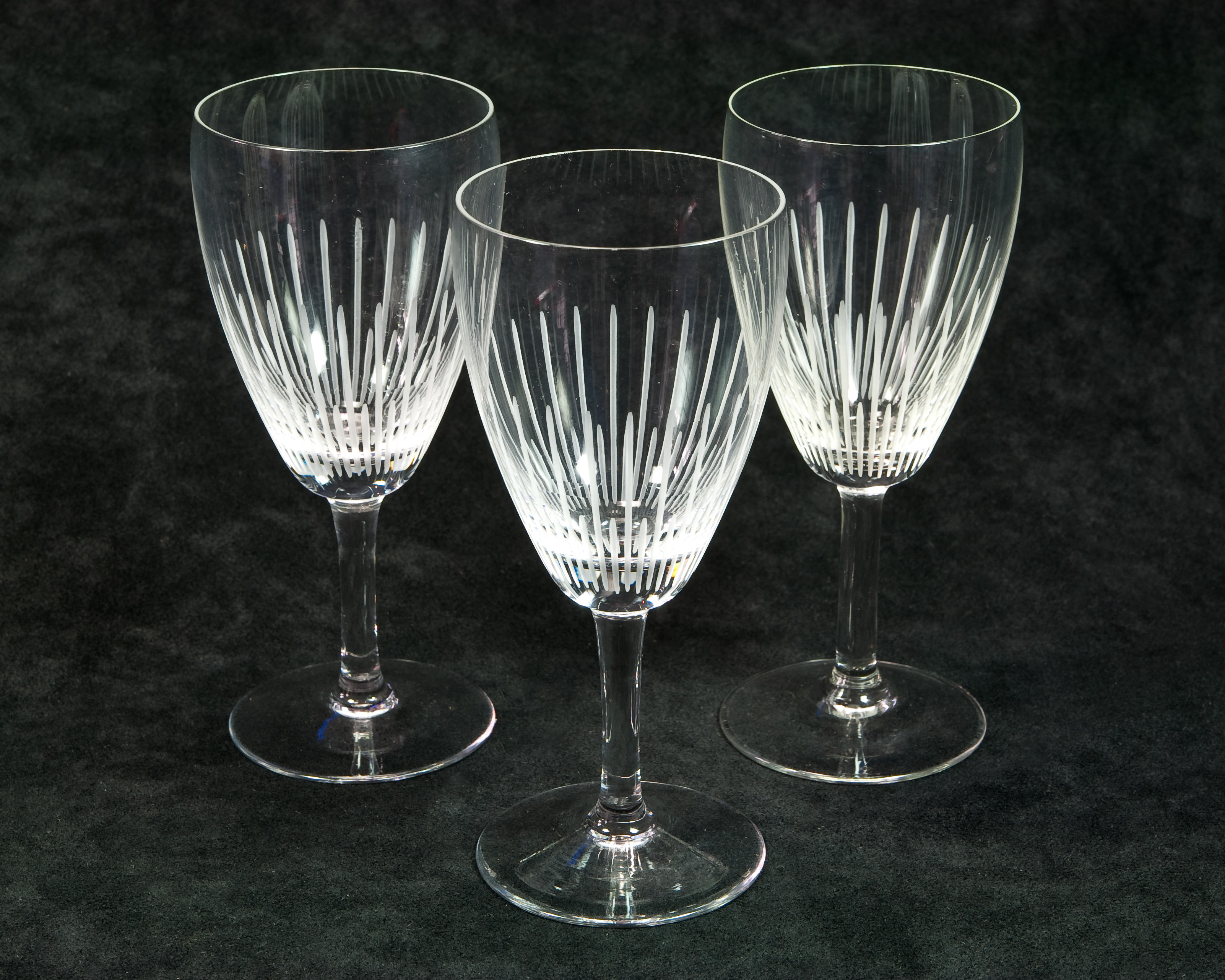 Diese Weingläser mit geschliffenem Dekor stammen aus dem zweiten Drittel des 20. Jahrhunderts.